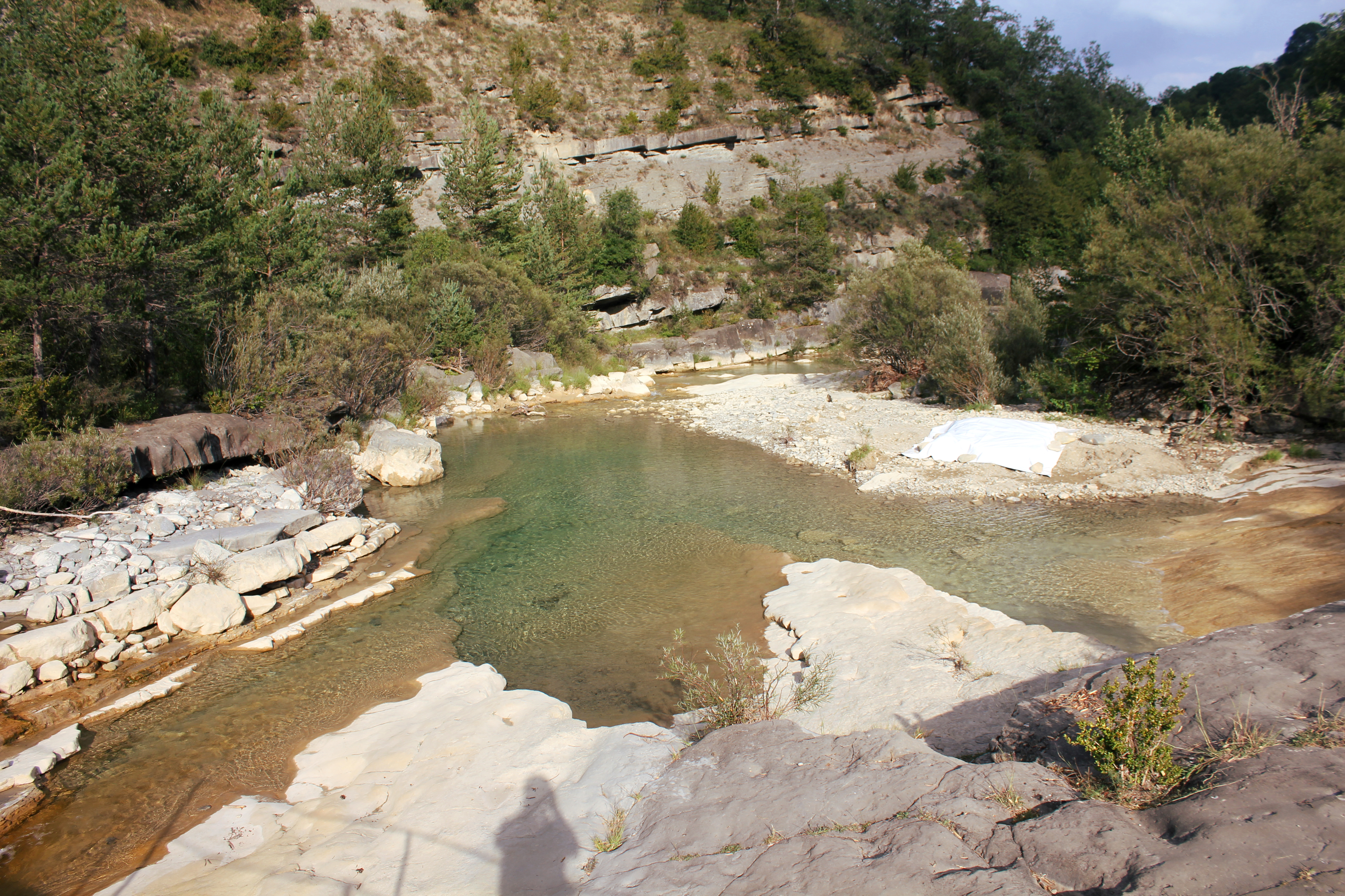 Aragonés: Punto d'afluencia d'o barranco de la Pera en o río Forcos, por debaixo d'as palancas de Bergua.